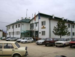 Сградата на Община Демир Хисар.